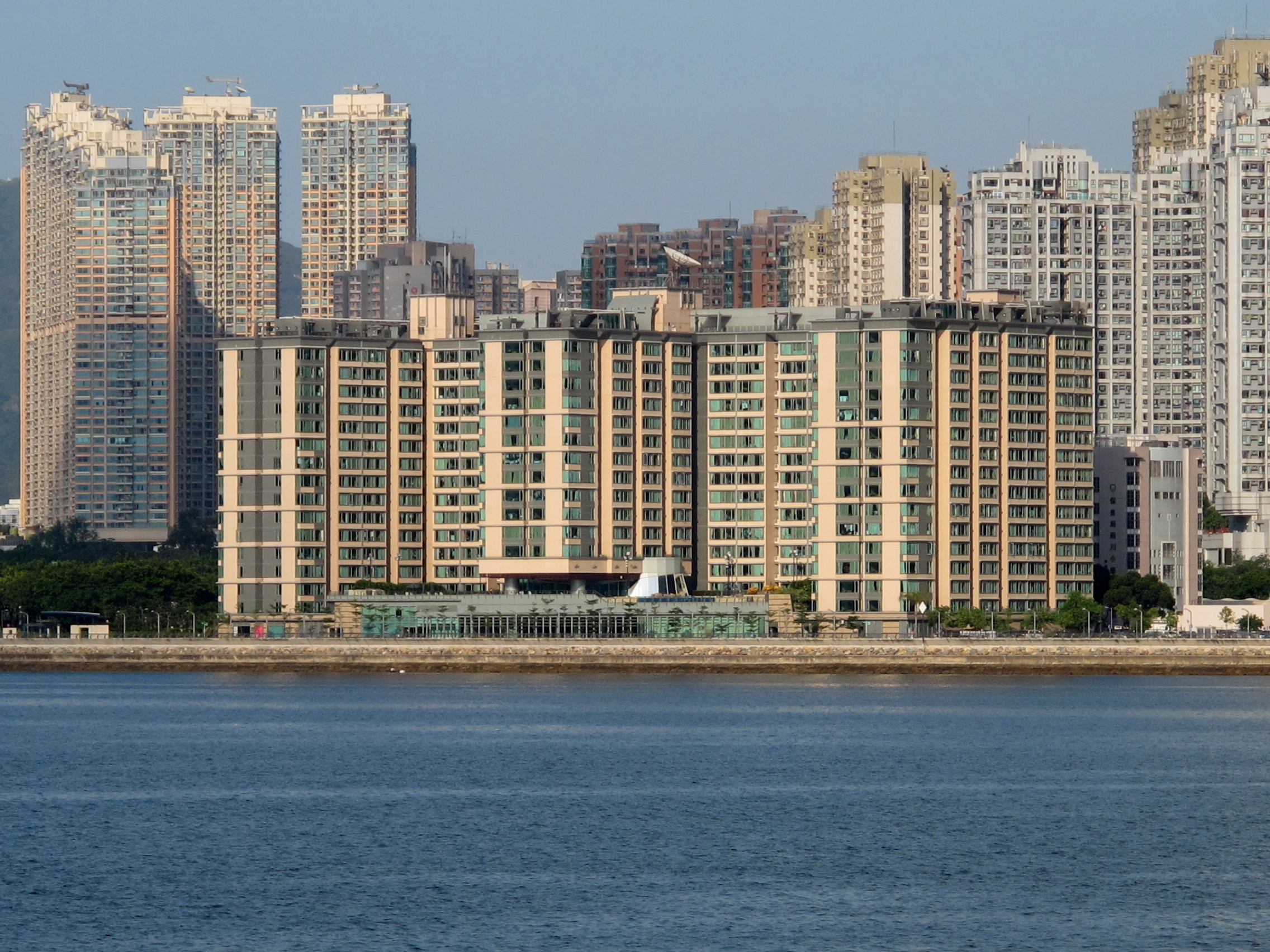 Horizon Suite Hotel in Ma On Shan